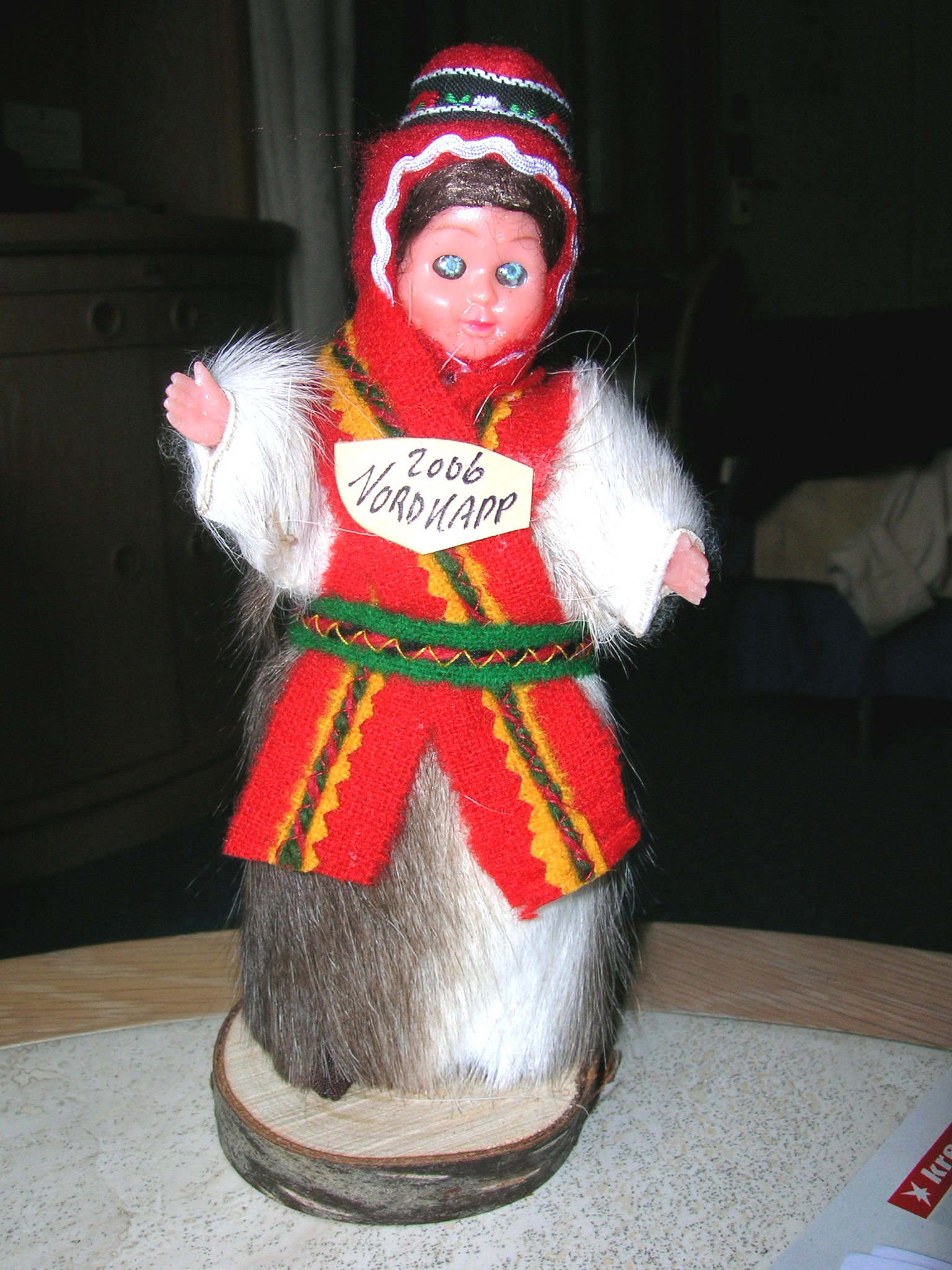 Popp a Sami-Truecht vum Nordkapp an Norwegen(2006)